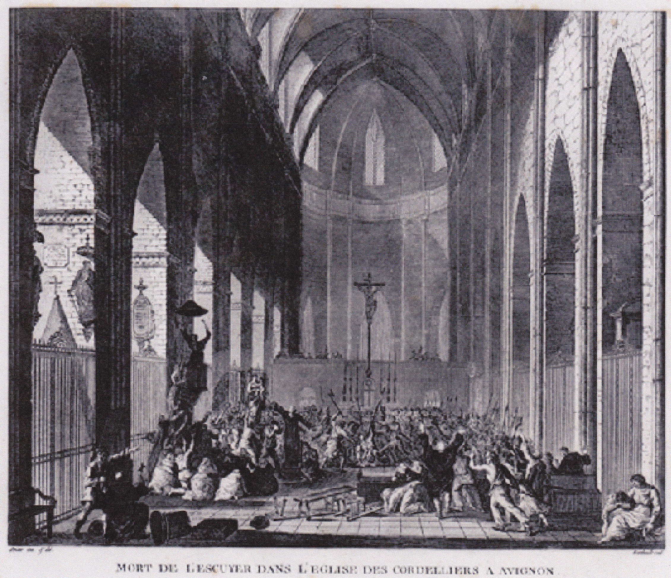 Mort de Nicolas Jean-Baptiste Lescuyer, aux Cordeliers d'Avignon, en 1791